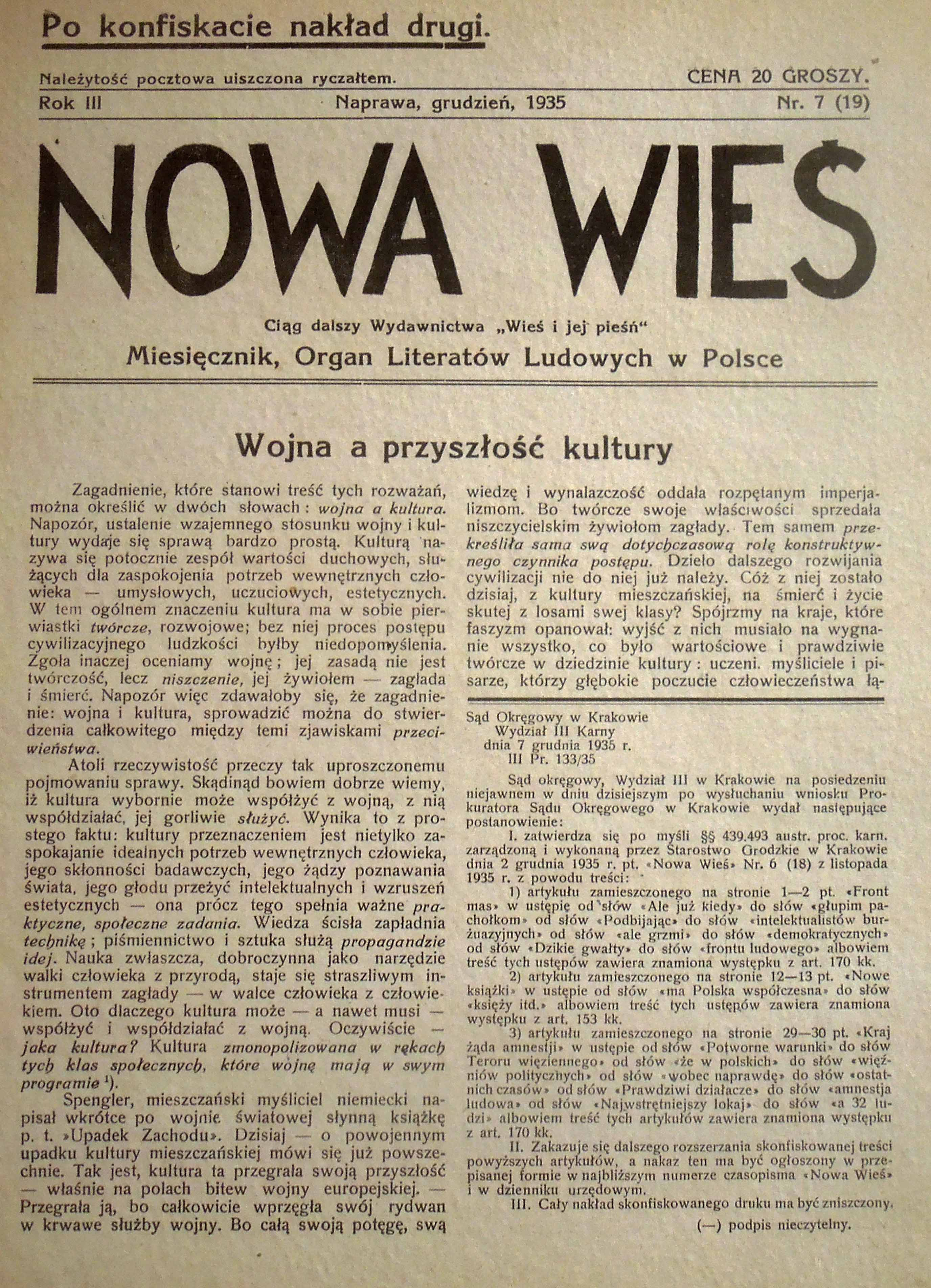 Nowa Wieś - miesięcznik, numer 7 (19) z grudnia 1935